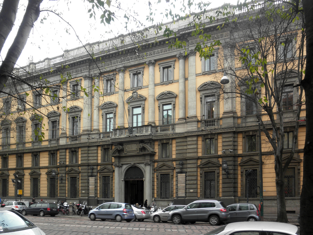 Palazzo della Società per le Strade Ferrate del Mediterraneo a Milano, in Foro Buonaparte 31. Fu costruito nel 1892 su progetto di Enrico Combi.